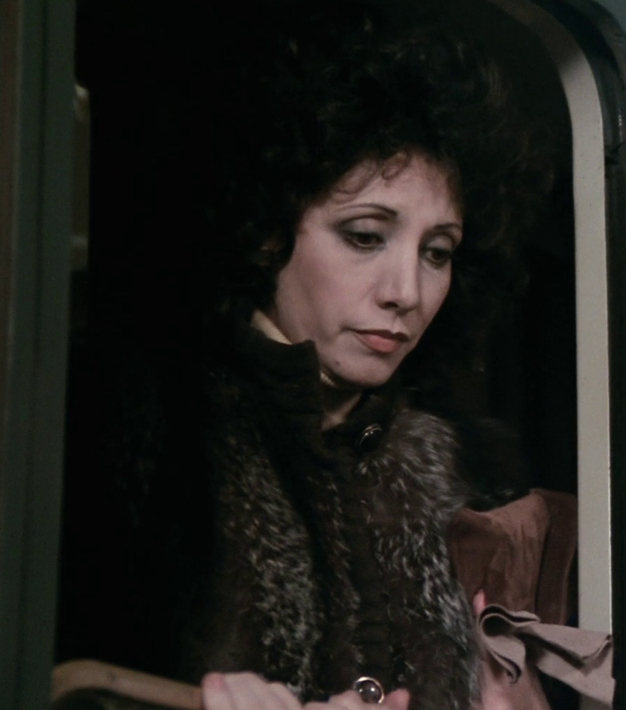 scena dal film Amici miei